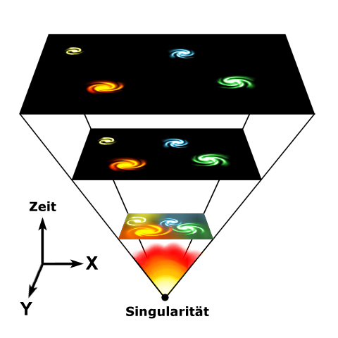 Entstehung des Universums beim Urknall